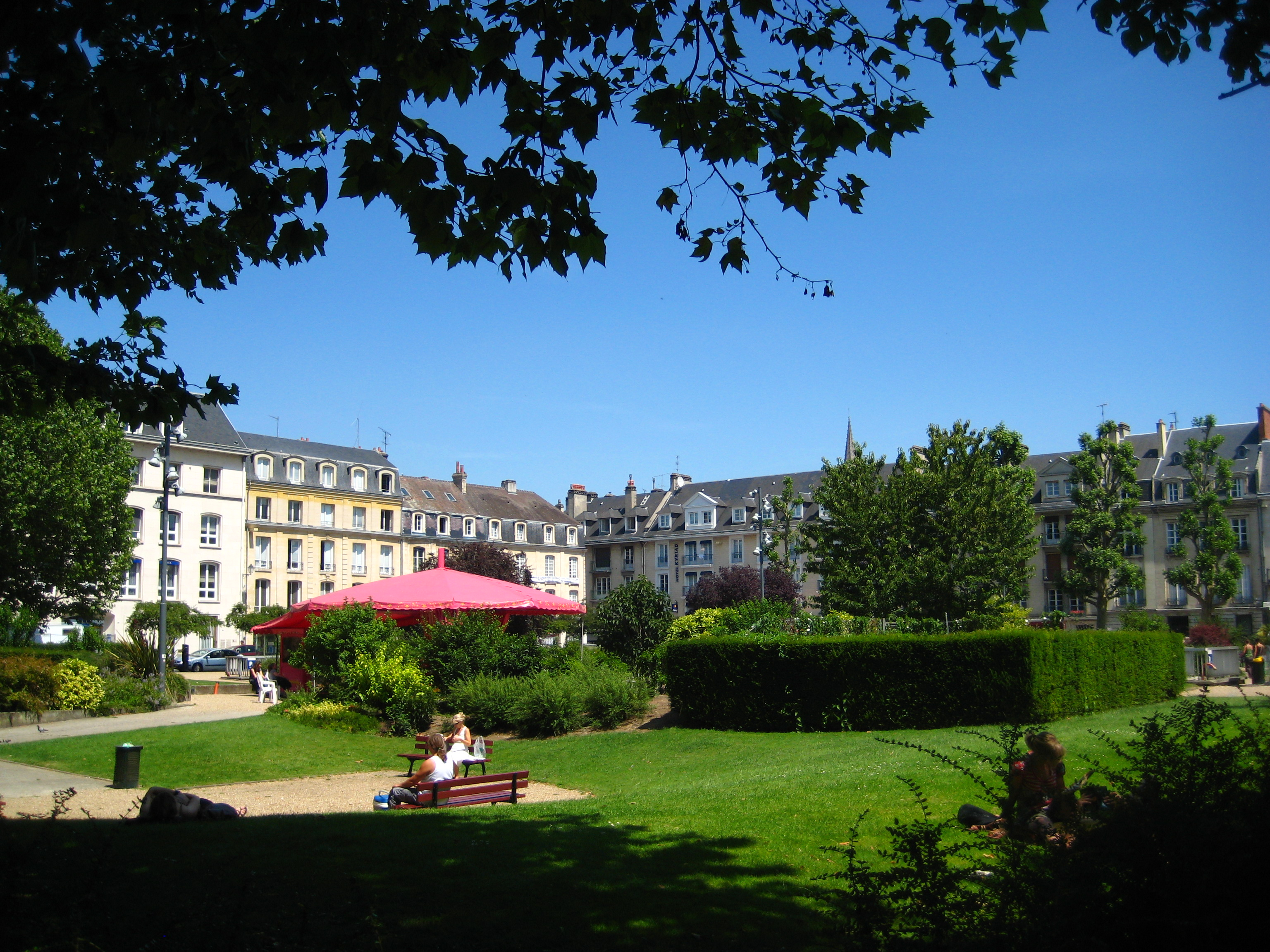 Place de la République à Caen, depuis l'angle sud-ouest